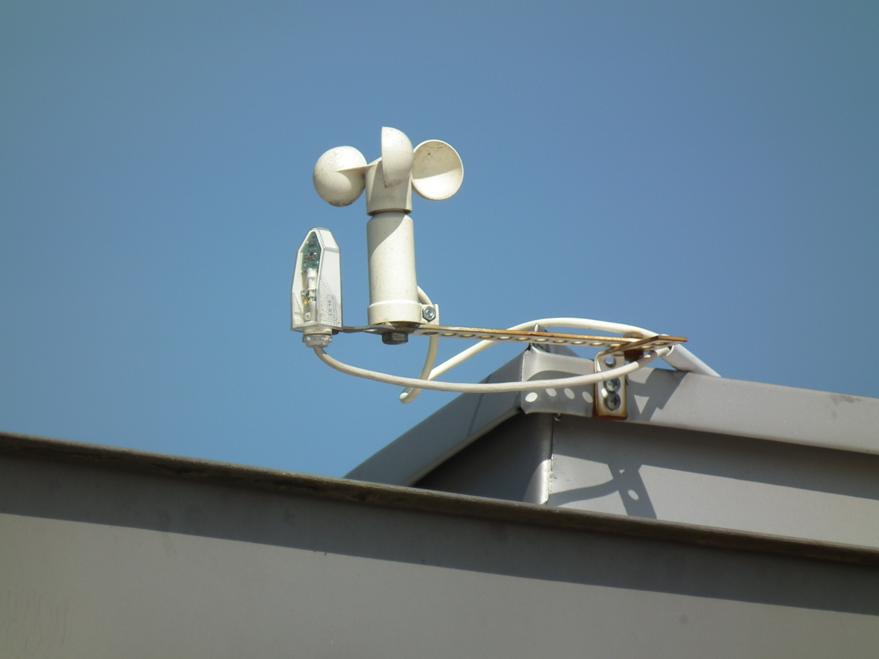 Windwächter